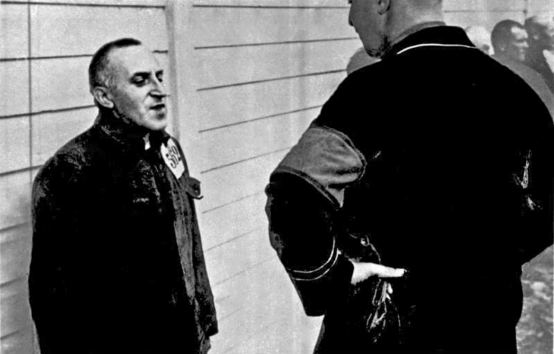 Carl von Ossietzky im KZ ADN-ZB Carl von Ossietzky. Publizist, als Häftling in einem Konzentrationslager Esterwegen. [Mai 1936 wird Ossietzky bis zu seinem Tode unter ständiger Bewachung der Polizei, im Staatskrankenhaus der Polizei in Berlin untergebracht .] Abgebildete Personen: Ossietzky, Carl von: Chefredakteur Die Weltbühne, KZ, Friedensnobelpreis 1935, Deutschland